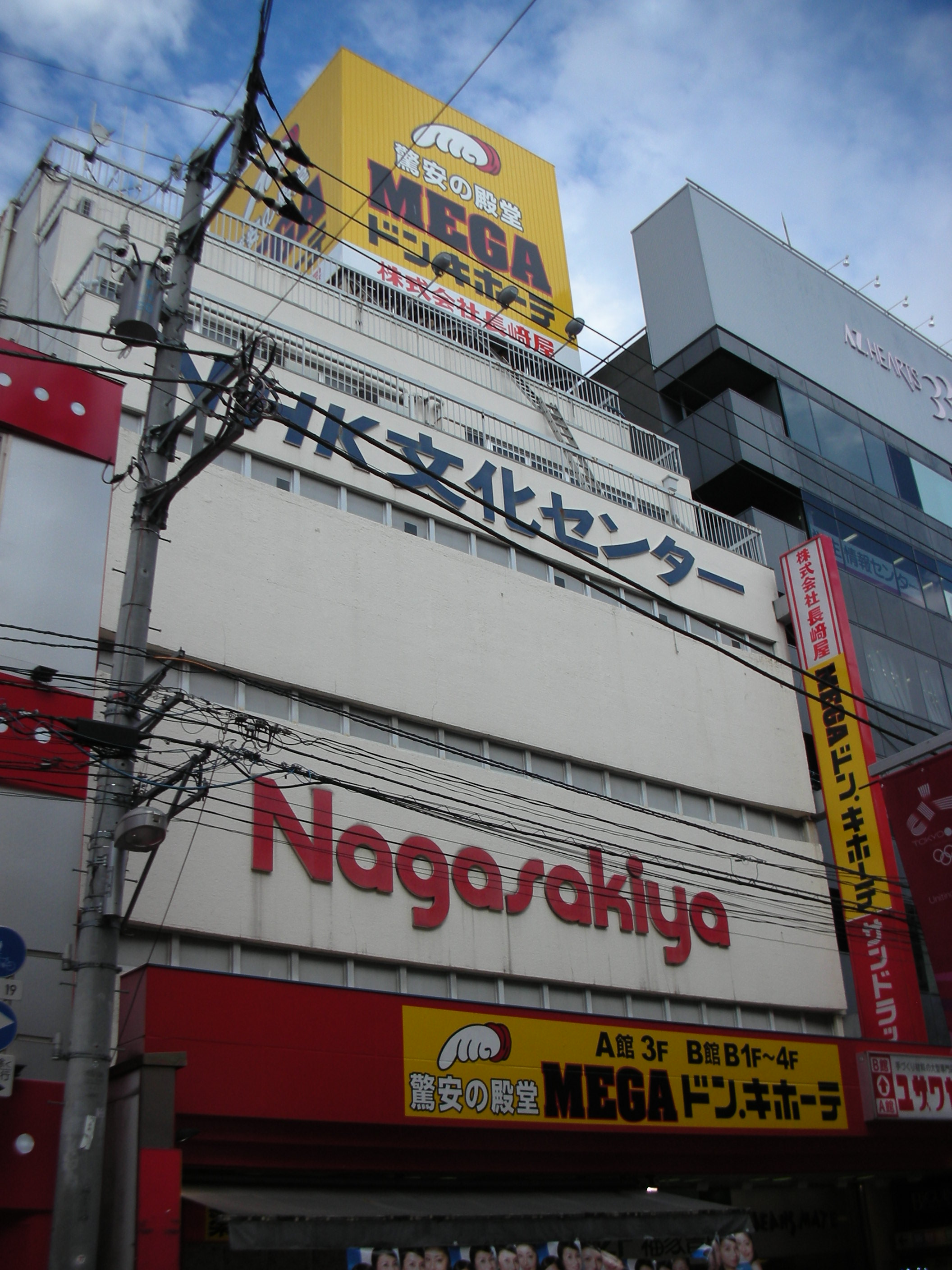 MEGAドン・キホーテ町田店の外観